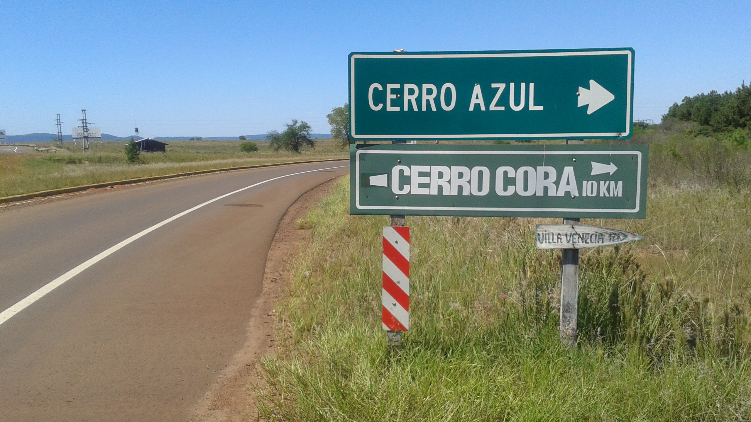 Cartel Cerro Azul-Cerro Corá (Provincia de Misiones, Argentina)